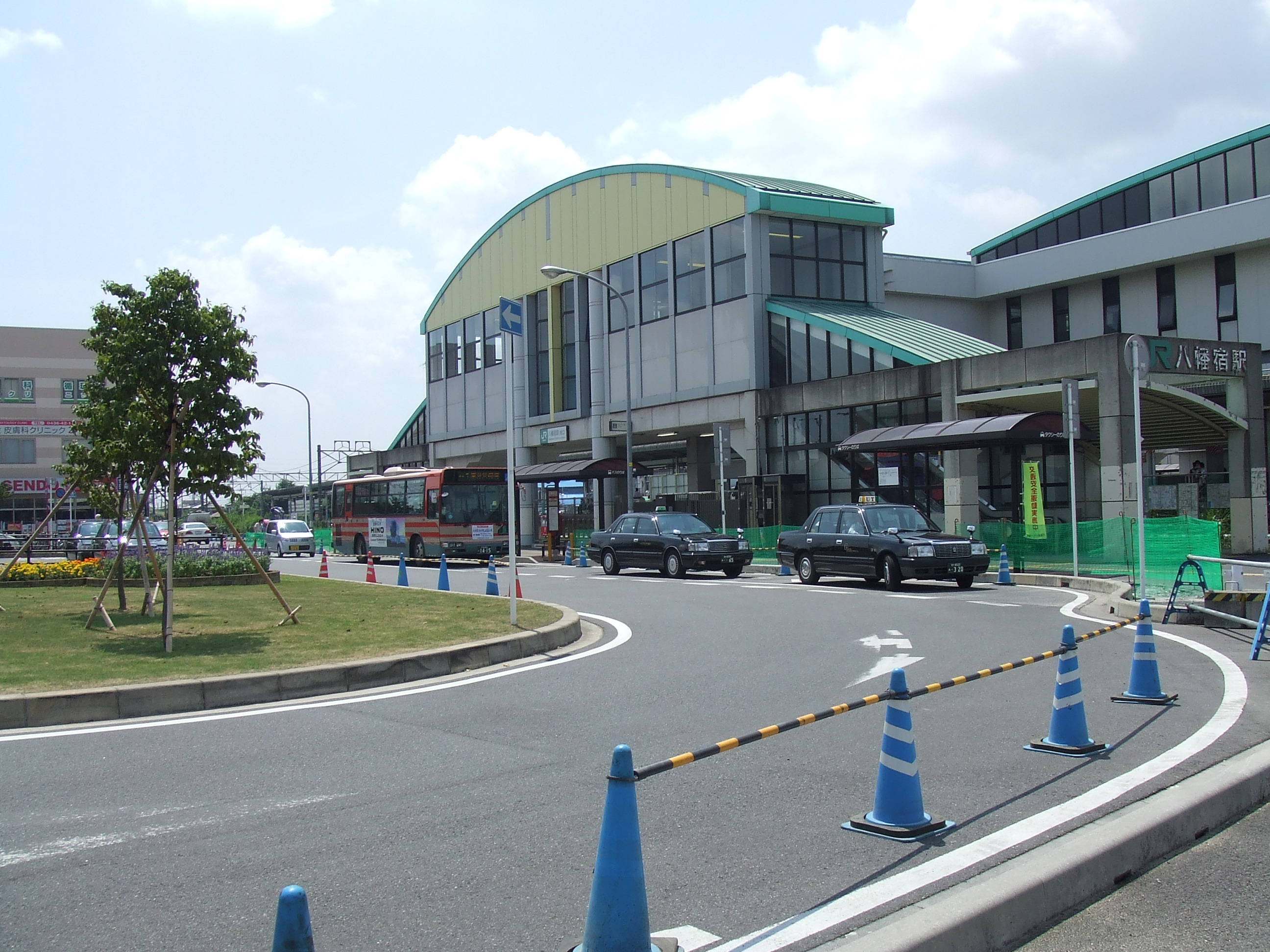 Yawatajuku Station east exit, Ichihara, Chiba, Japan